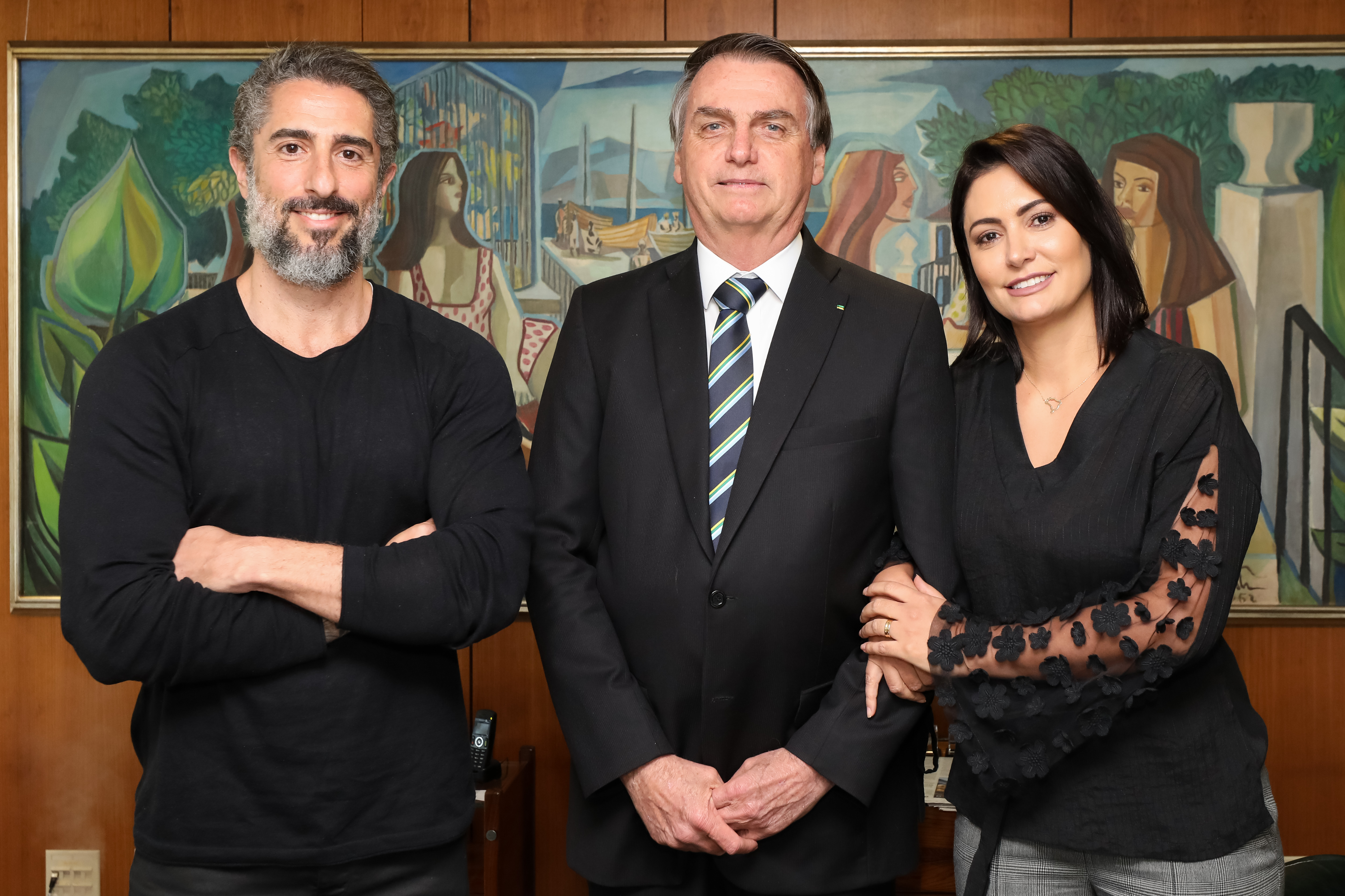 (Brasília - DF, 18/07/2019) Presidente da República, Jair Bolsonaro, recebe o apresentador, Marcos Mion, no gabinete Presidencial. Foto: Marcos Corrêa/PR